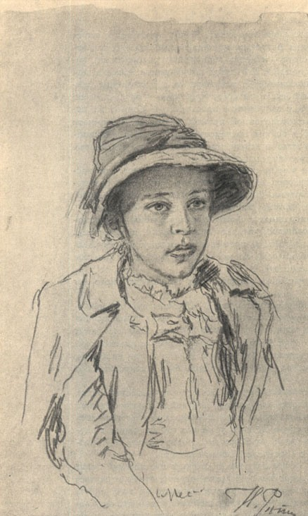 Рисунок И.Е. Репина